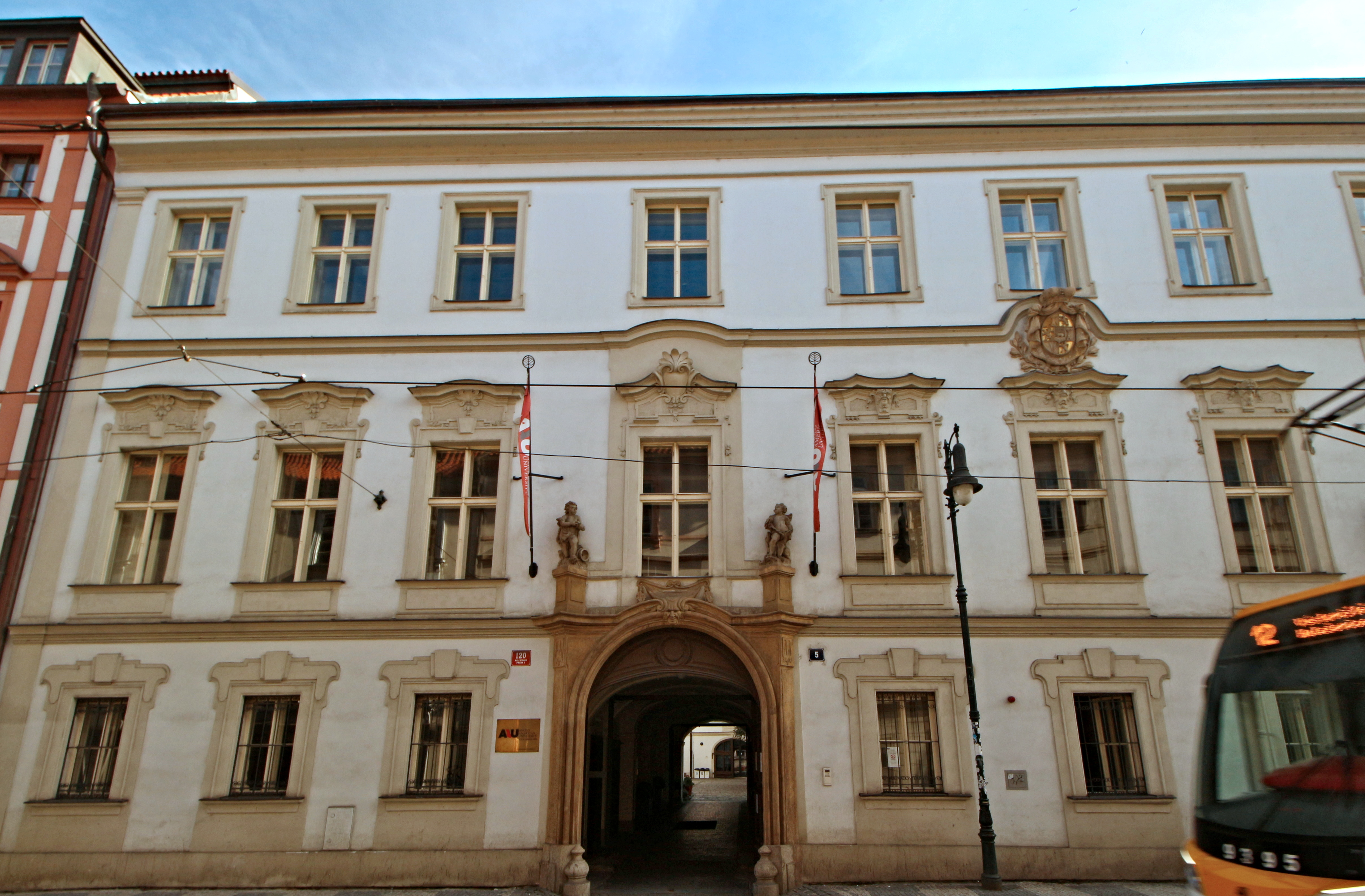 Praha 1-Malá Strana, Letenská ulice